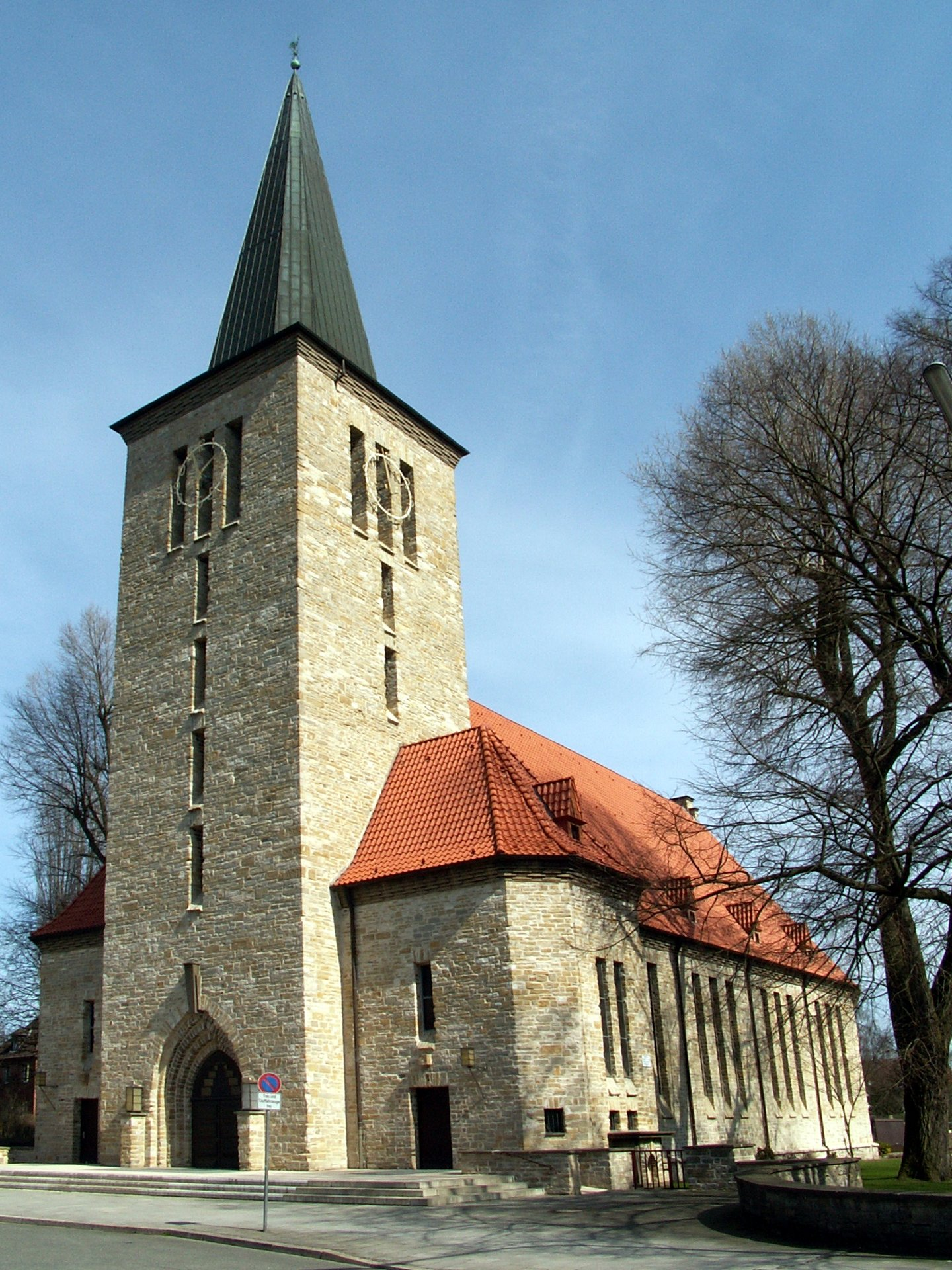 ev. Pauluskirche in Osnabrück, Stadtteil Schinkel, Ansicht von Südwesten